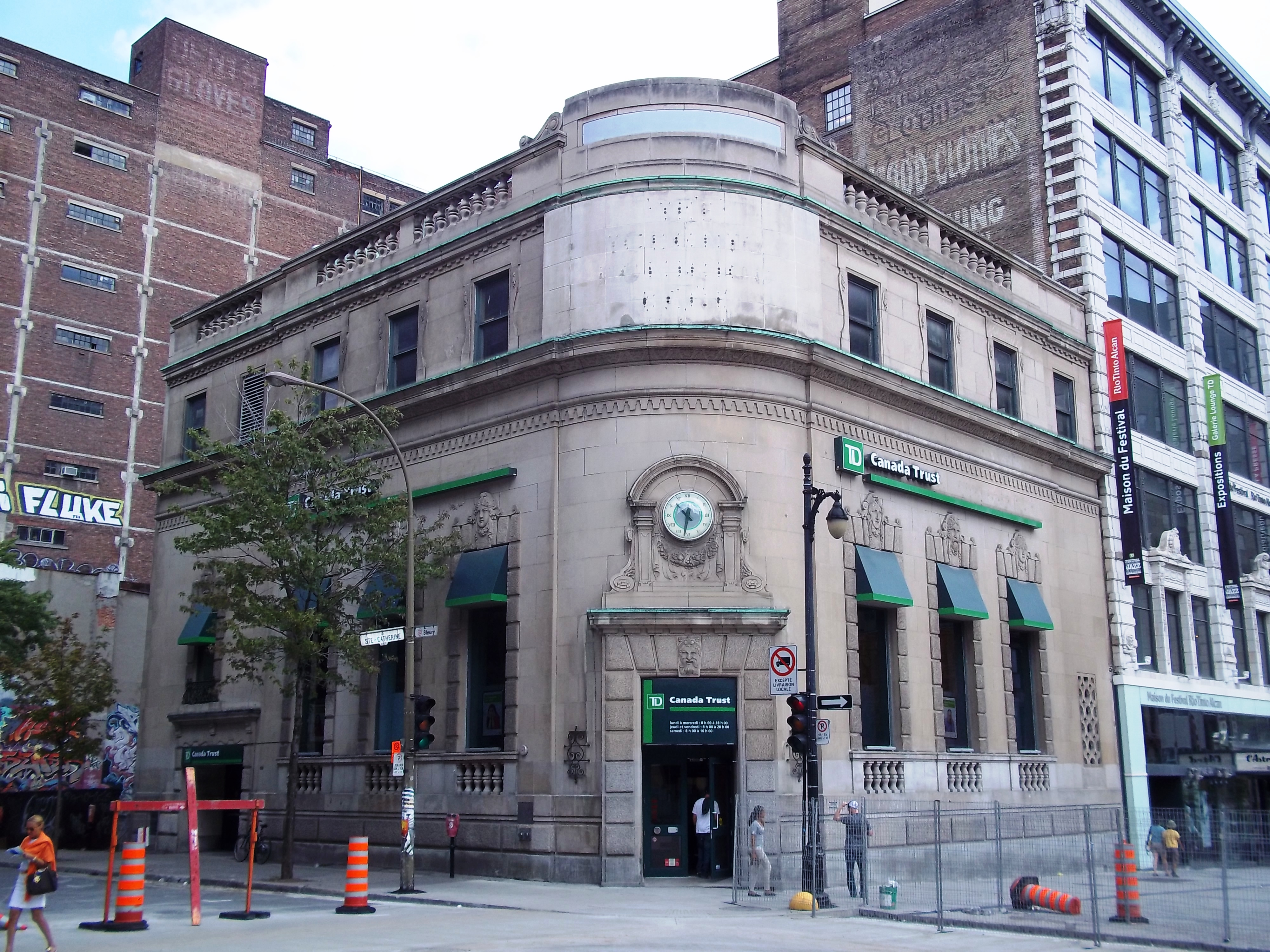 Banque Toronto-Dominion, 1401, rue Bleury, Montréal (info)